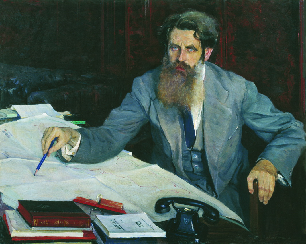 Портрет академика О. Ю. Шмидта Жанр: Мужской портрет Год: 1937 Тип объекта: Картина Местонахождение: Национальный художественный музей Республики Беларусь, Минск Материалы: холст, масло Размеры: 97 х 121 см